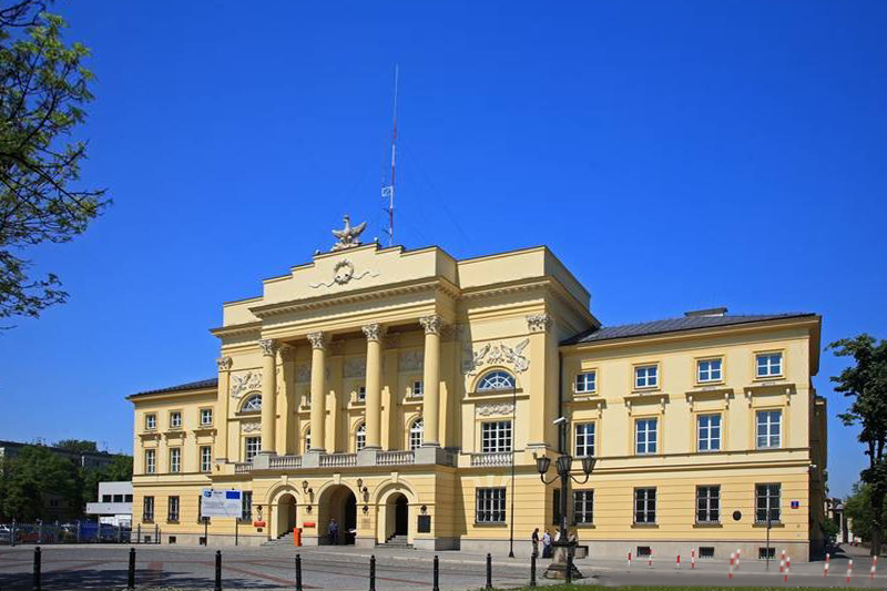 Warszawa (Polska)